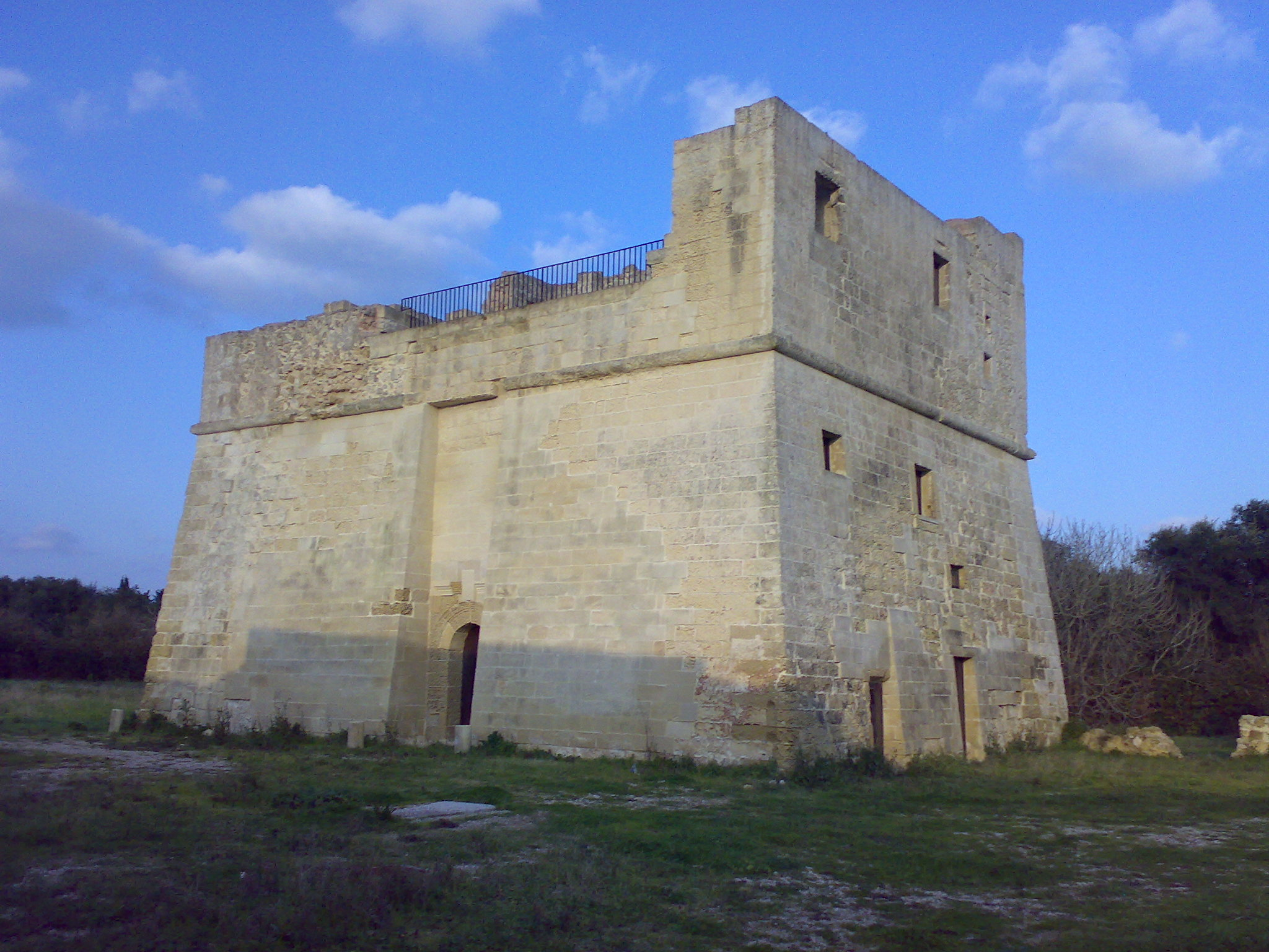 Torre di Roca Nuova, provincia di Lecce